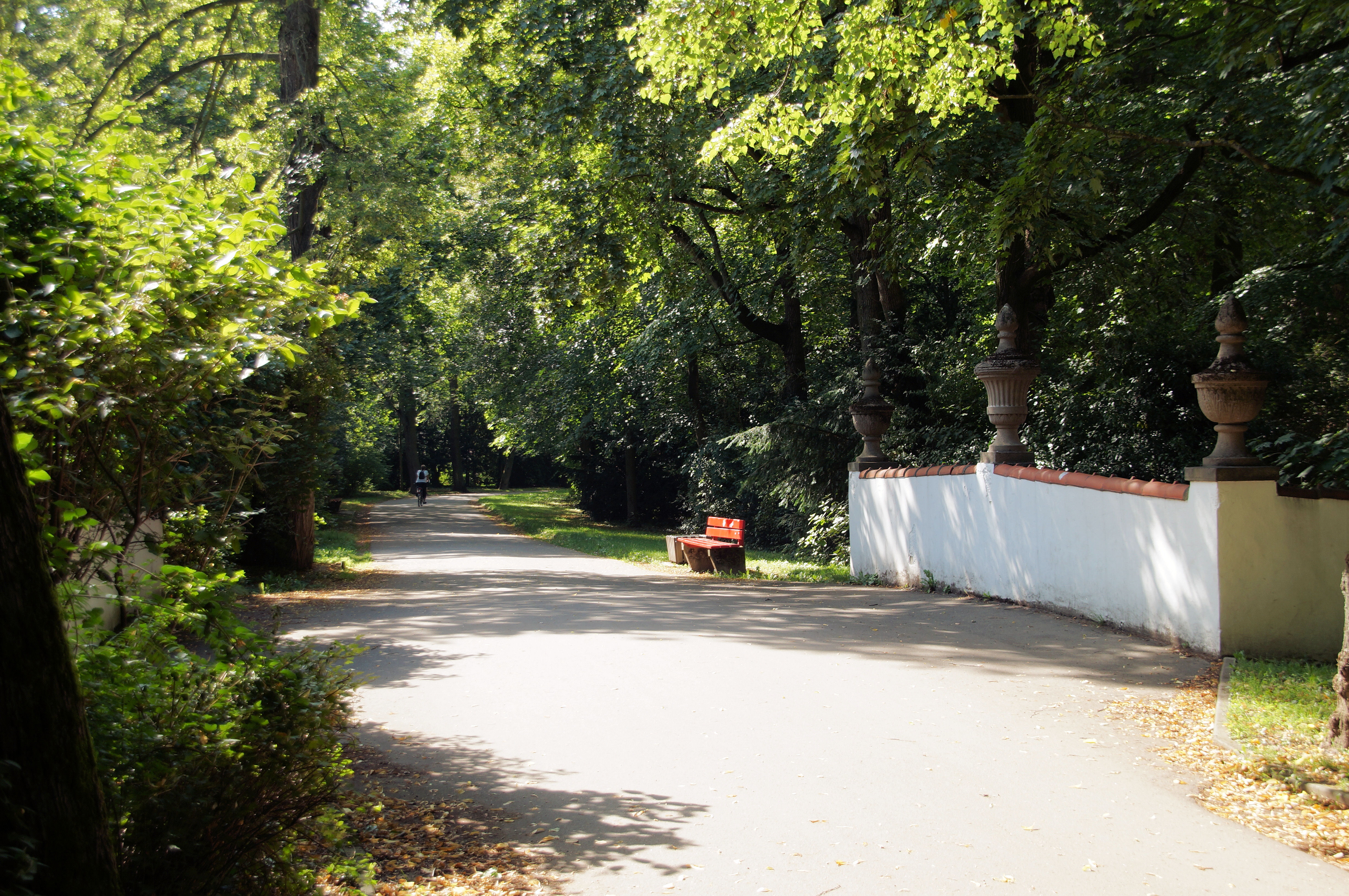 Fürst-Anselm-Allee, Allee im Englischen Stil mit zahlreichen Denkmälern, 1779-81 von Fürst Carl Anselm von Thurn und Taxis anstelle der nachmittelalterlichen Vorwerke und Bastionen als mittlerer Teil des Grüngürtels um die Mauern der Altstadt angelegt; siehe Prebrunnallee und Ostenallee